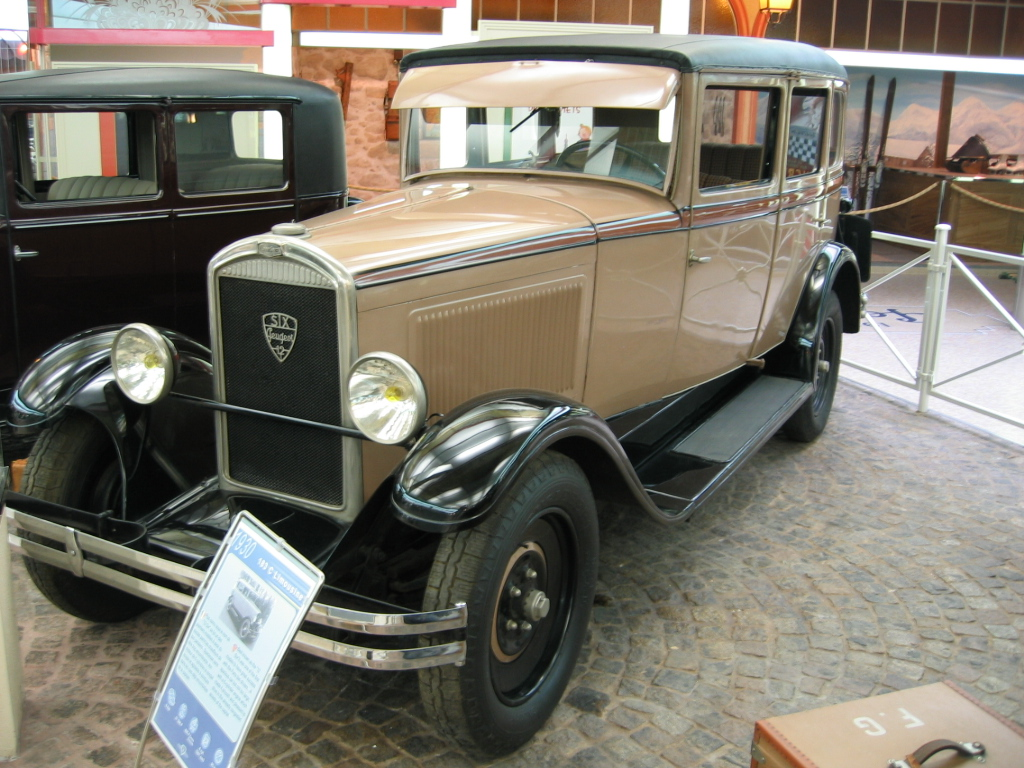 Peugeot Type 183 - Musée Peugeot Sochaux